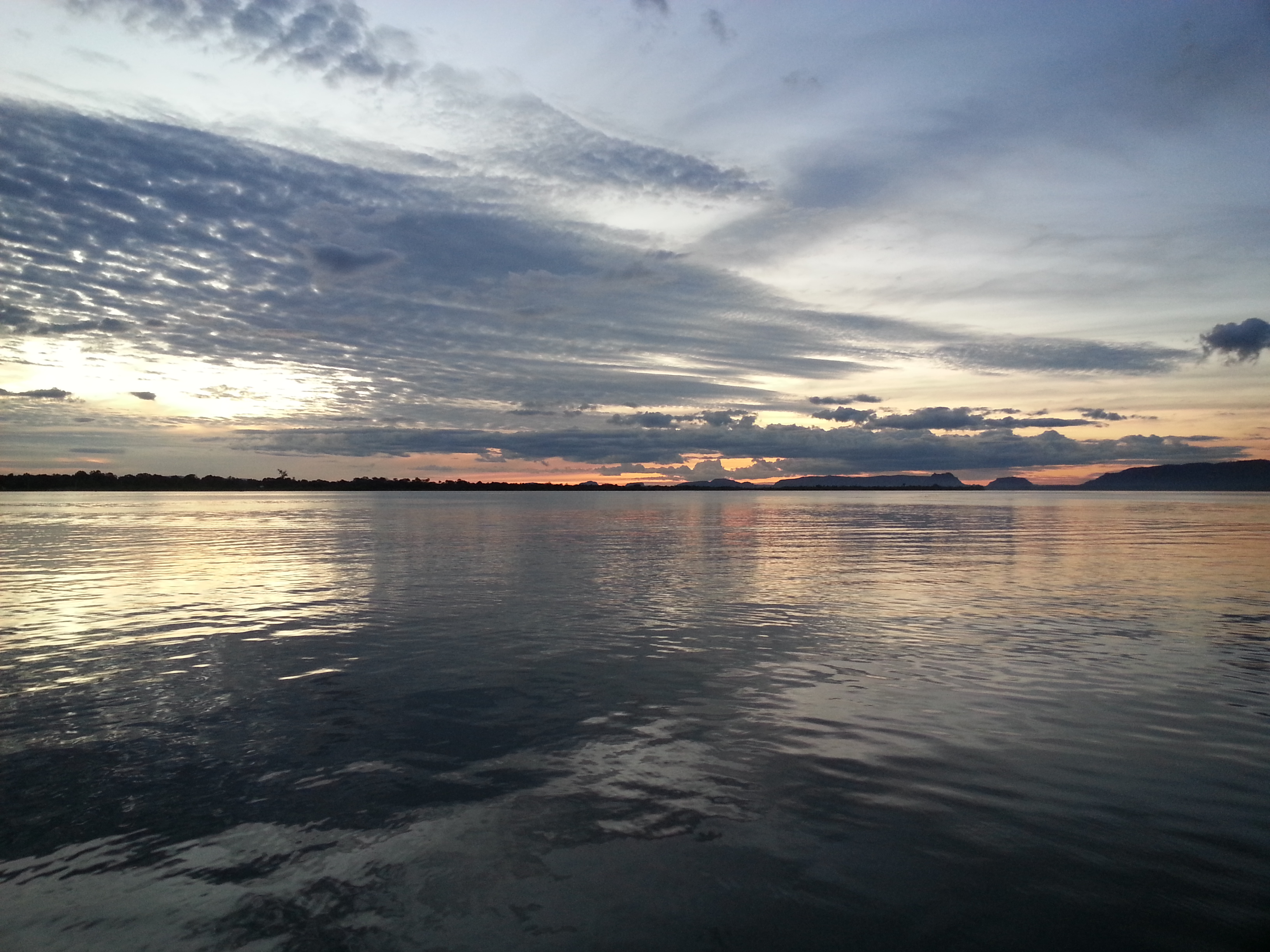 Fim de tarde às margens do Rio Tocantins, na altura da cidade de Carolina-Maranhão-Brasil.